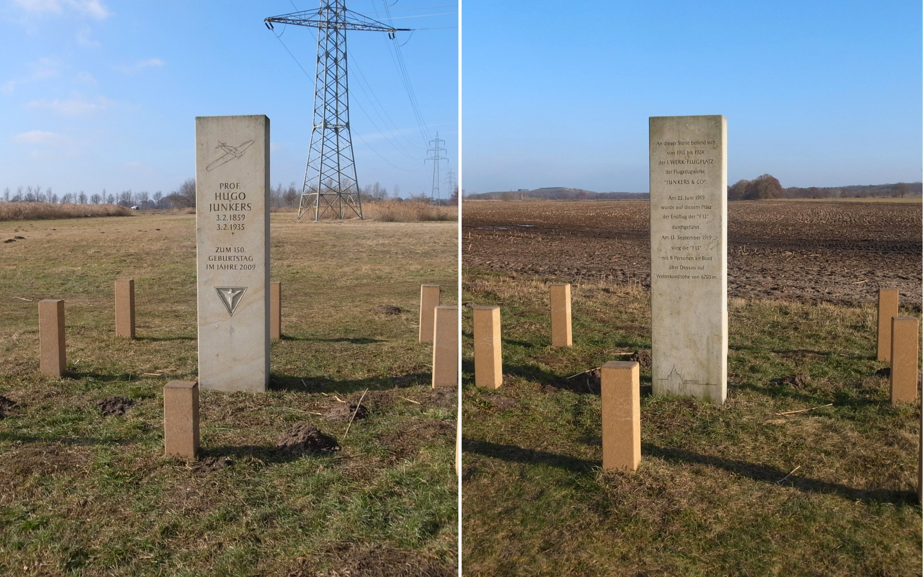 Dessau, Stele im Ortsteil Alten zur Erinnerung an Hugo Junkers und den Erstflug / Höhenweltrekord der Junkers F13